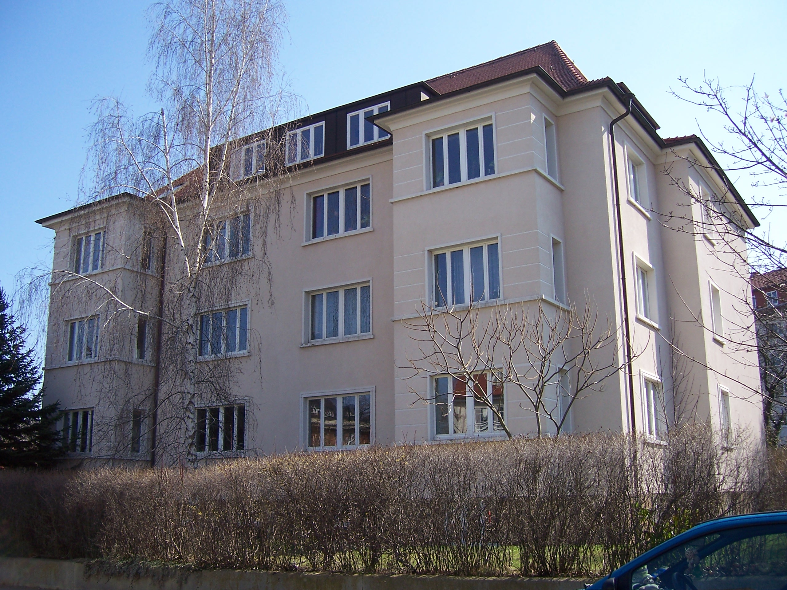 Letztes Wohnhaus des Denkmalpflegers und Chronisten Fritz Löffler, Liebigstraße 29, Dresden-Südvorstadt